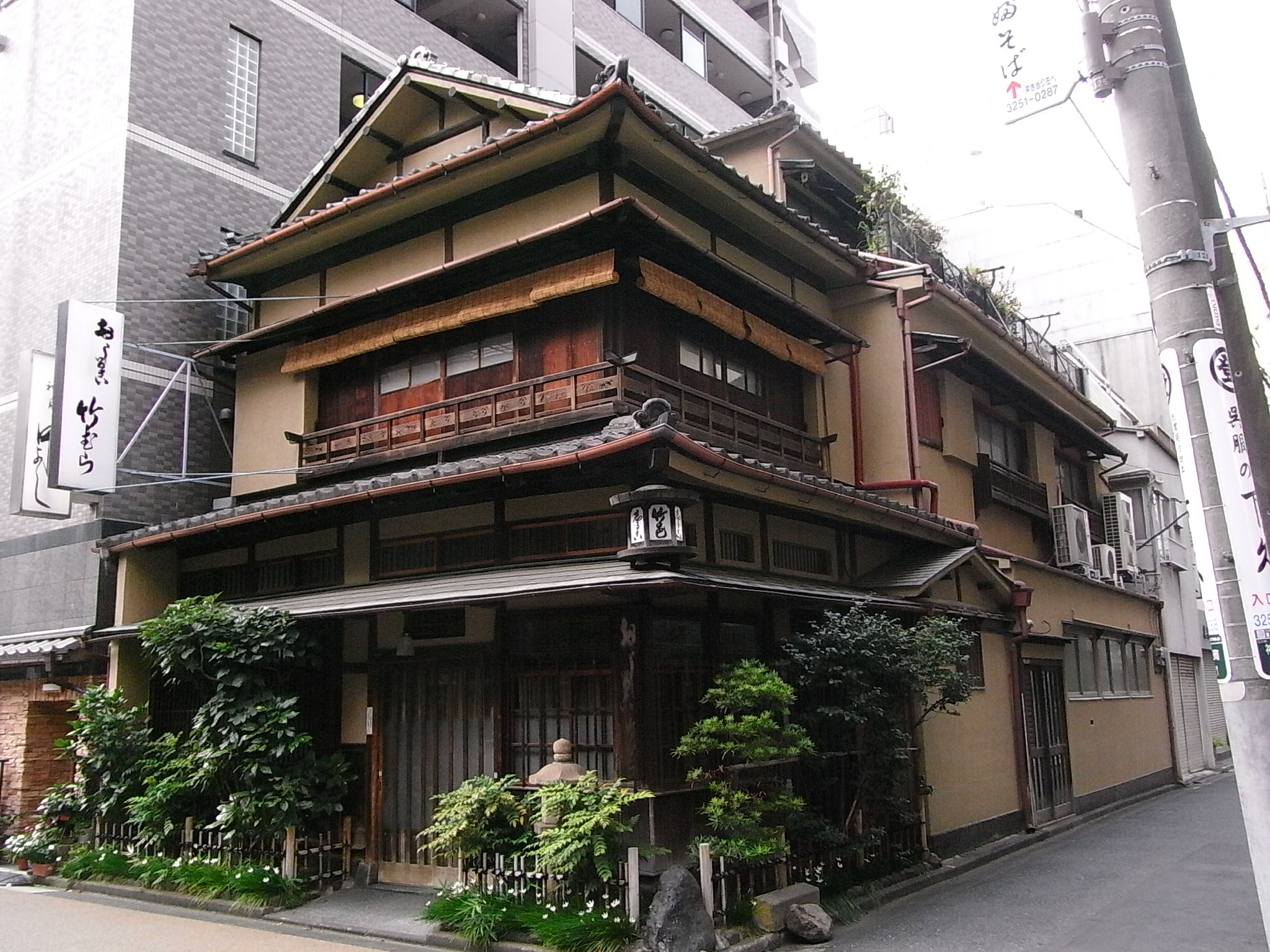 竹むらの外観（2009.9.27）